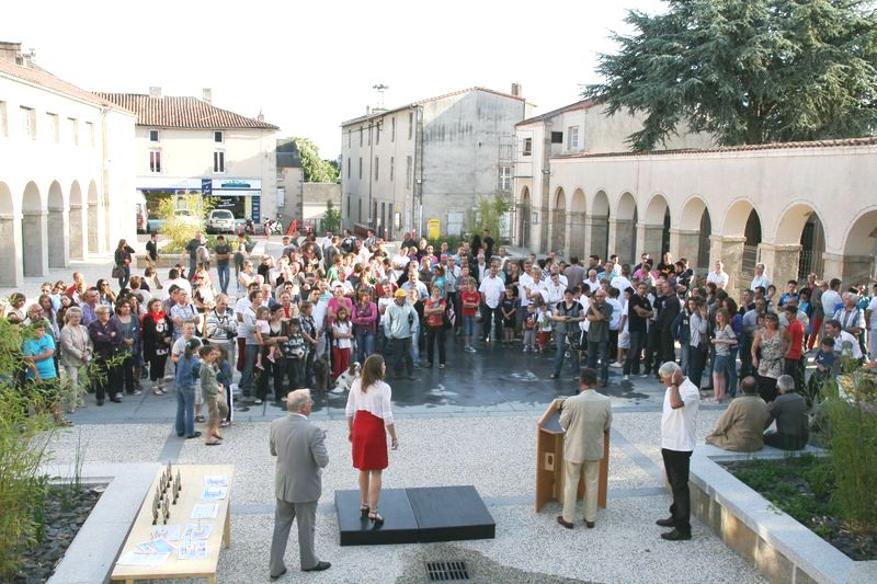 Français